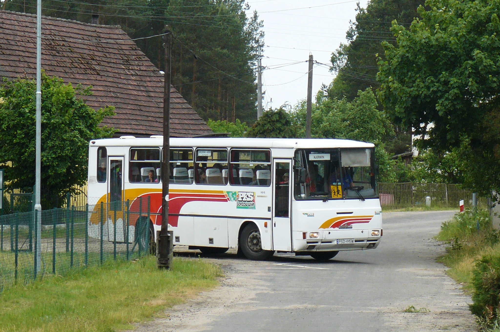 Karwin, gm. Drezdenko.